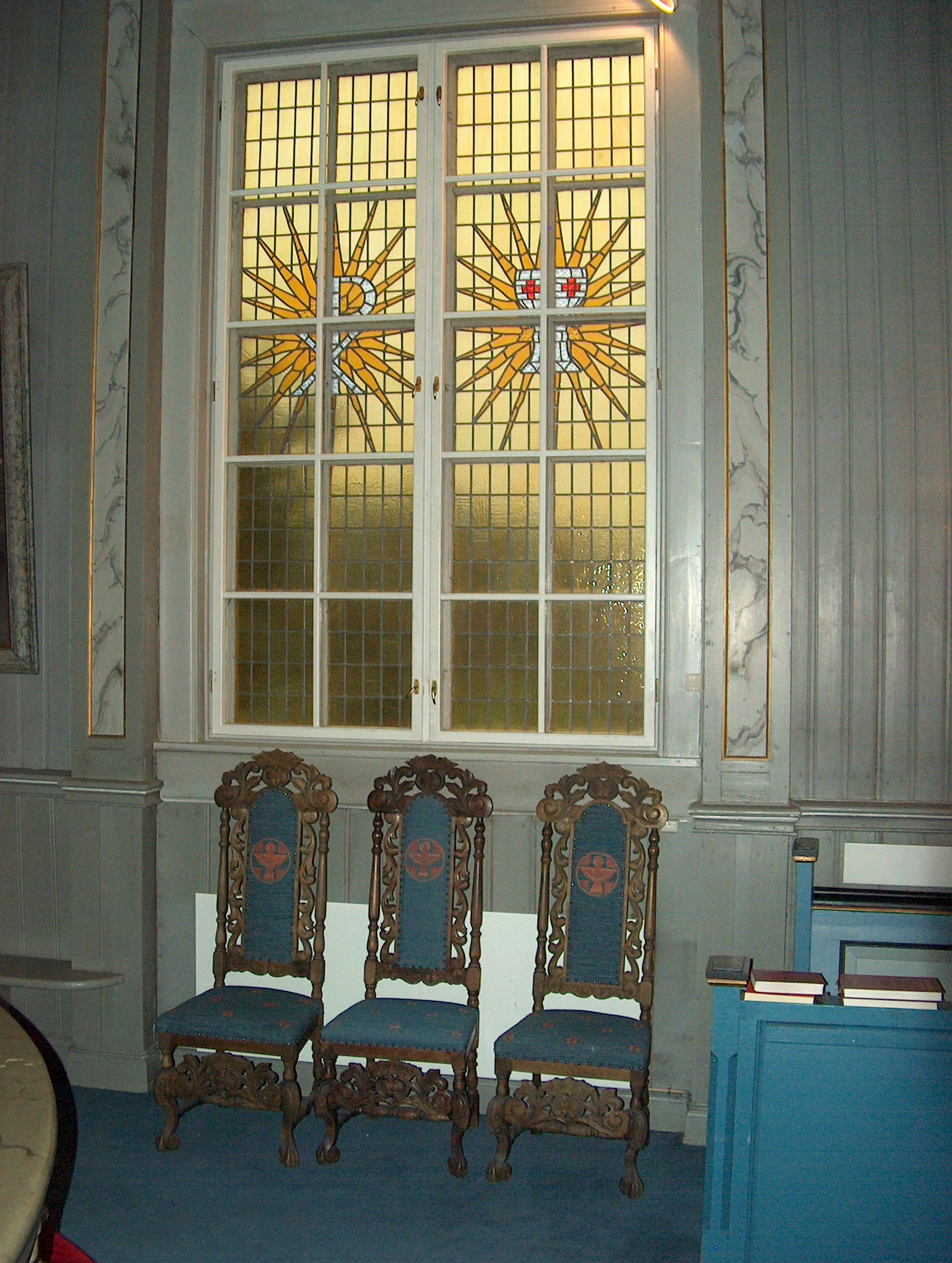 Lunder kirke, Sokna (korstoler, sørveggen i koret)